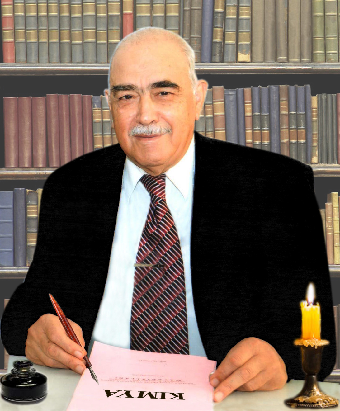 professor Yolçuyev Allahyar Bəxtiyar oğlu